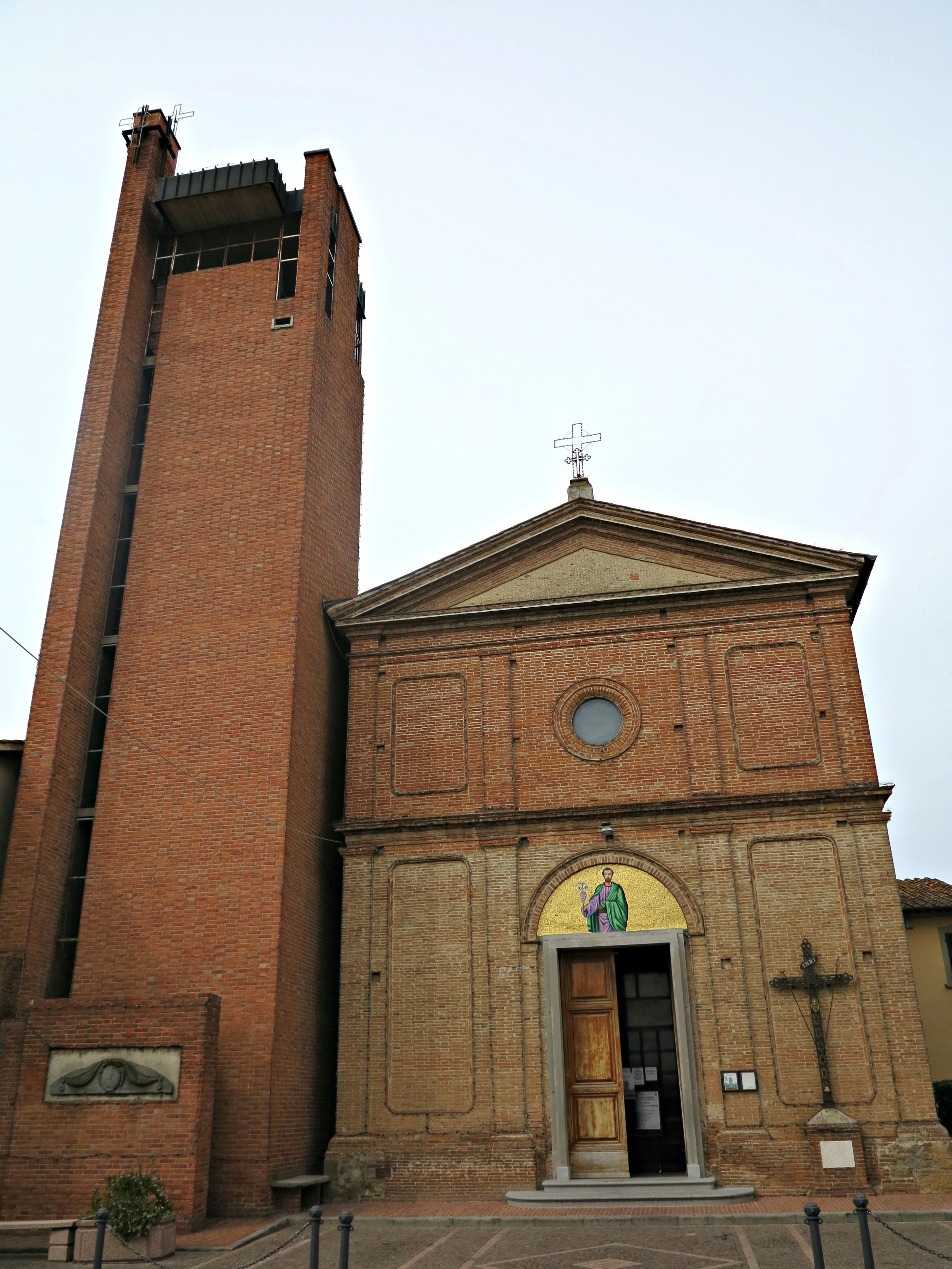 Campanile e Chiesa di San Giuseppe, Capanne, Montopoli in Val d'Arno